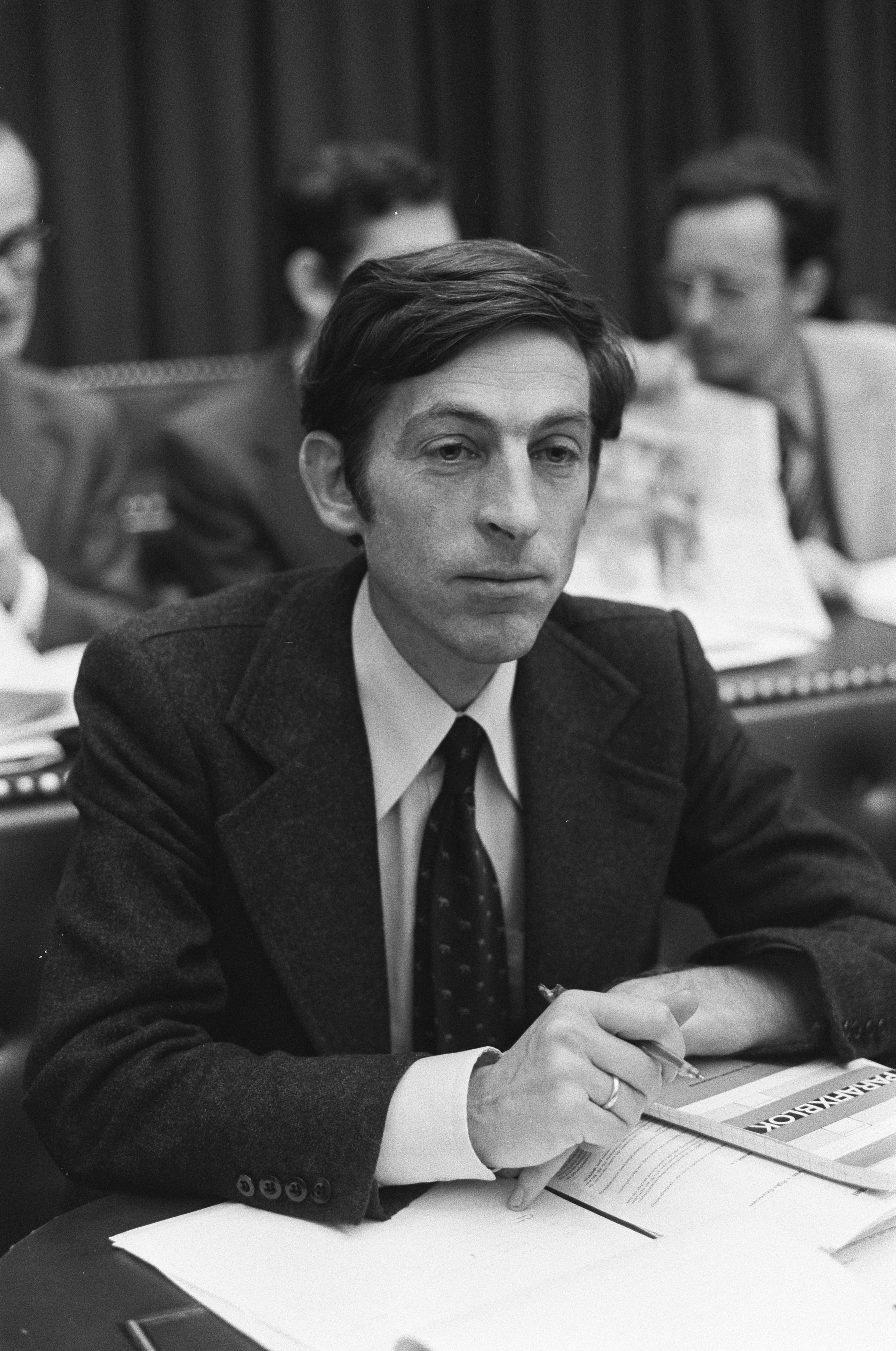 Collectie / Archief : Fotocollectie Anefo Reportage / Serie : [ onbekend ] Beschrijving : Algemene beschouwingen Tweede Kamer; Beumer (ARP) Datum : 9 oktober 1975 Locatie : Den Haag, Zuid-Holland Trefwoorden : overheidsbegrotingen, parlementaire debatten, parlementariërs, politiek, portretten Persoonsnaam : Beumer, B. Instellingsnaam : ARP Fotograaf : Peters, Hans / Anefo Auteursrechthebbende : Nationaal Archief Materiaalsoort : Negatief (zwart/wit) Nummer archiefinventaris : bekijk toegang 2.24.01.05 Bestanddeelnummer : 928-1975